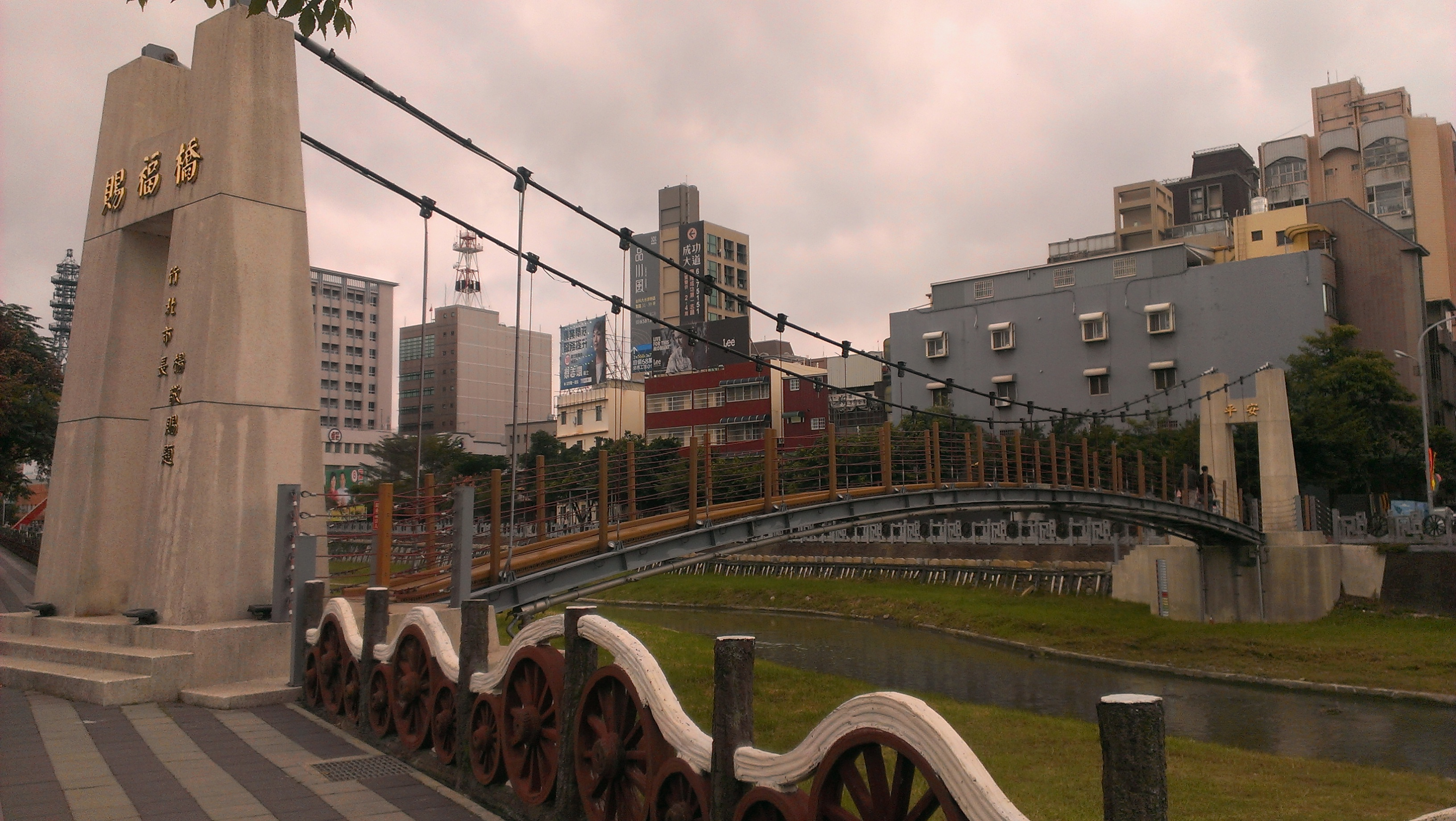 中文（台灣）: 新竹縣竹北市文化里賜福橋